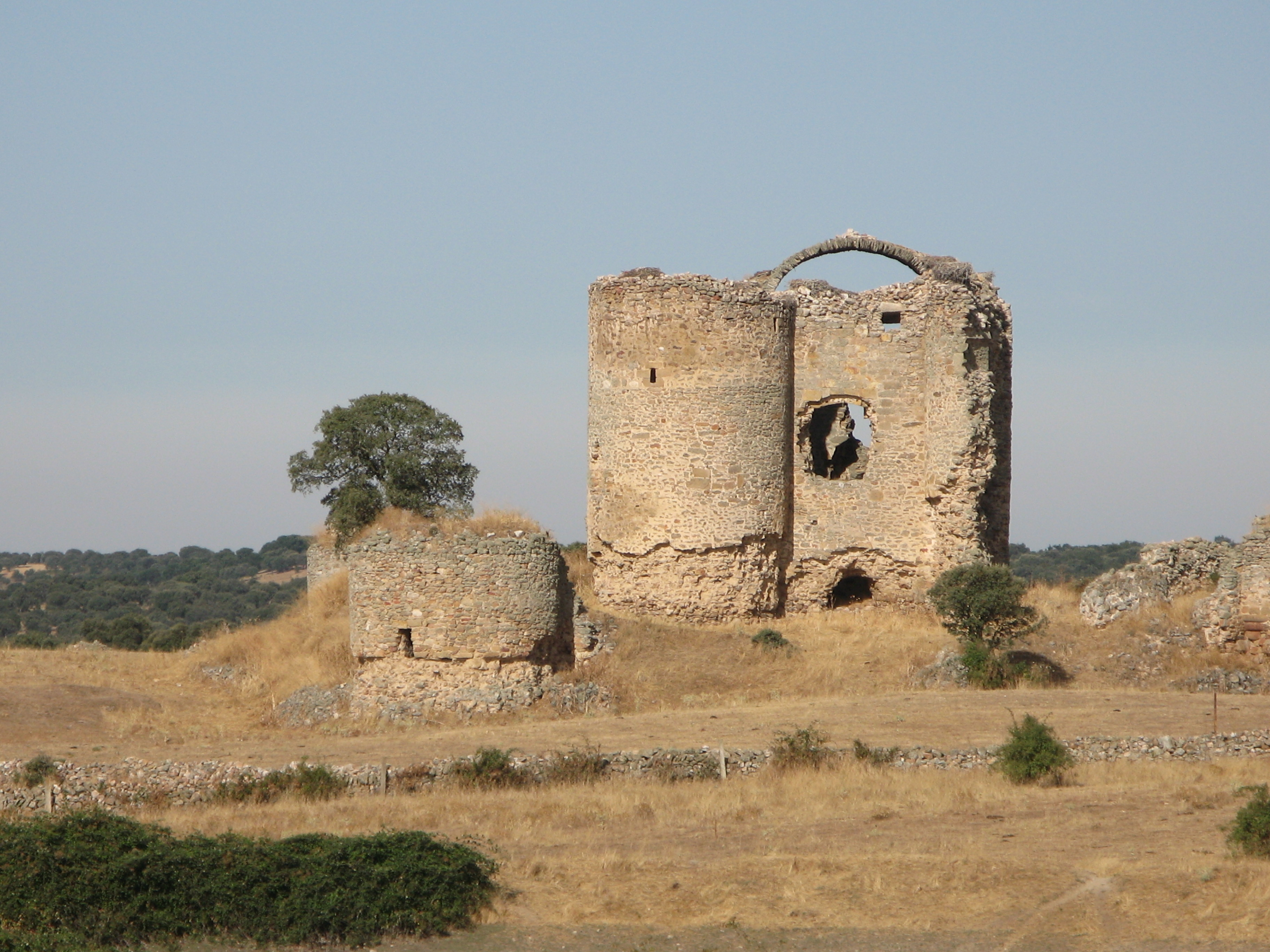 Castillo del Asmesnal en Alfaraz de Sayago, provincia de Zamora, Castilla y León, España